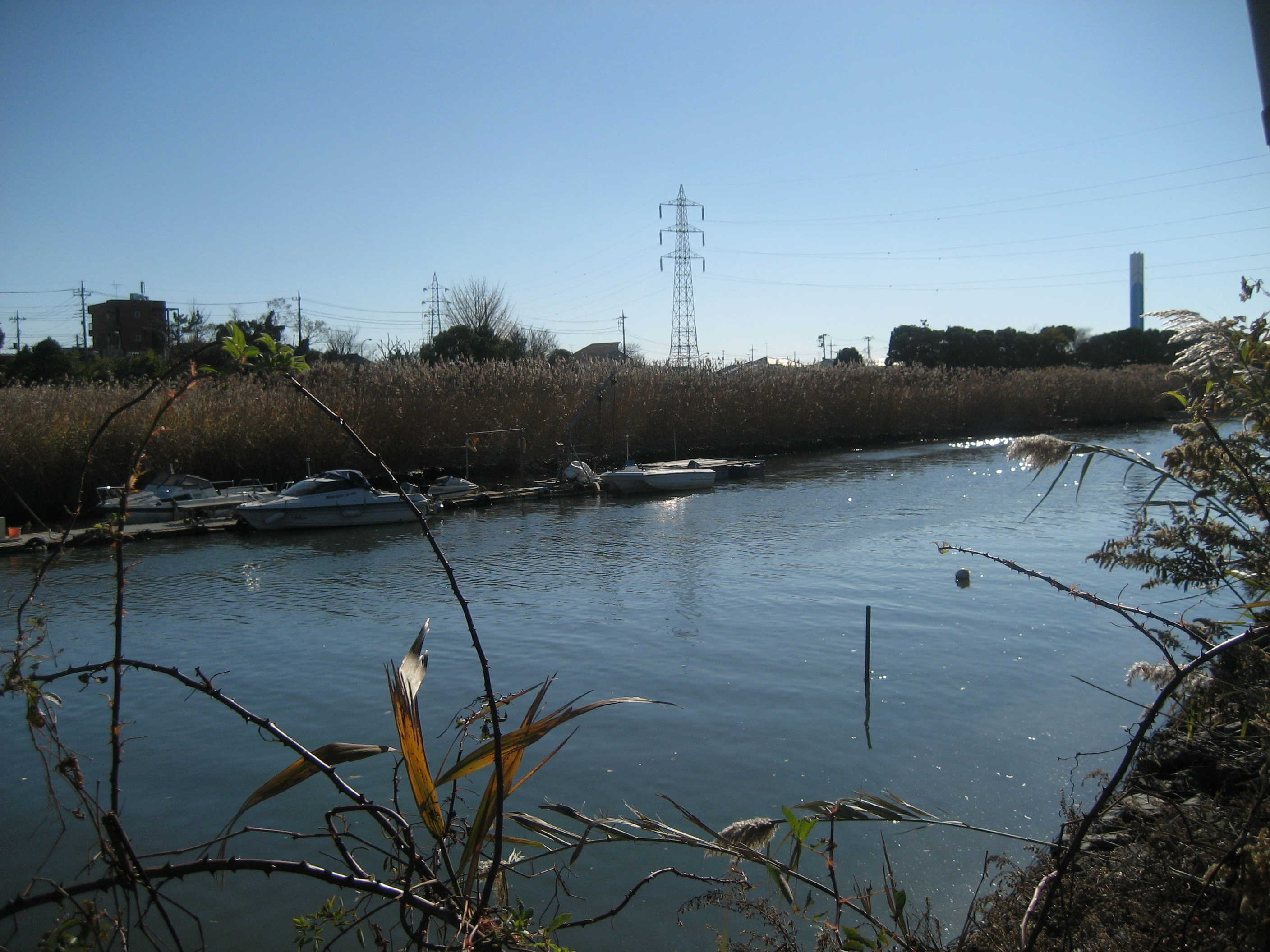 大場川、中川との合流点付近（対岸は葛飾区）